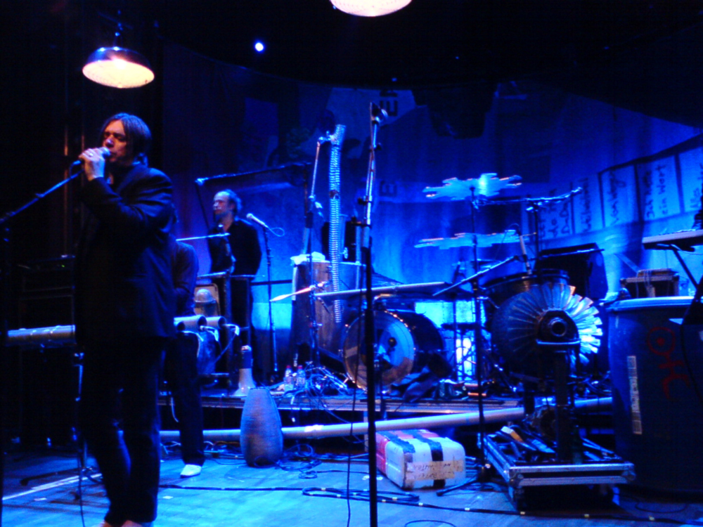 Einstürzende Neubauten performing at Berns